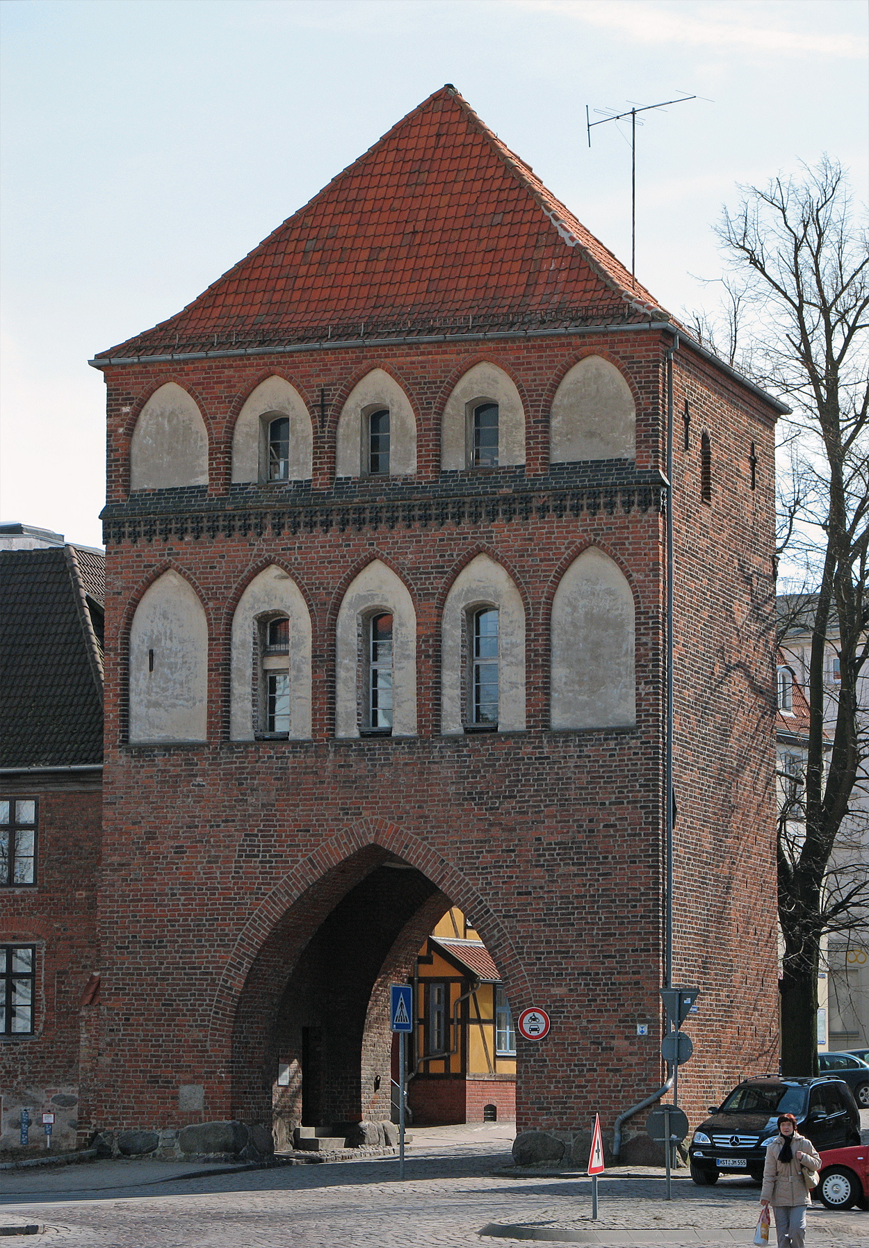 Beschreibung: Kniepertor in Stralsund / Frontside Frontside of the old citygate Kniepertor in Stralsund / Germany Fotograf: Darkone, 24. März 2006